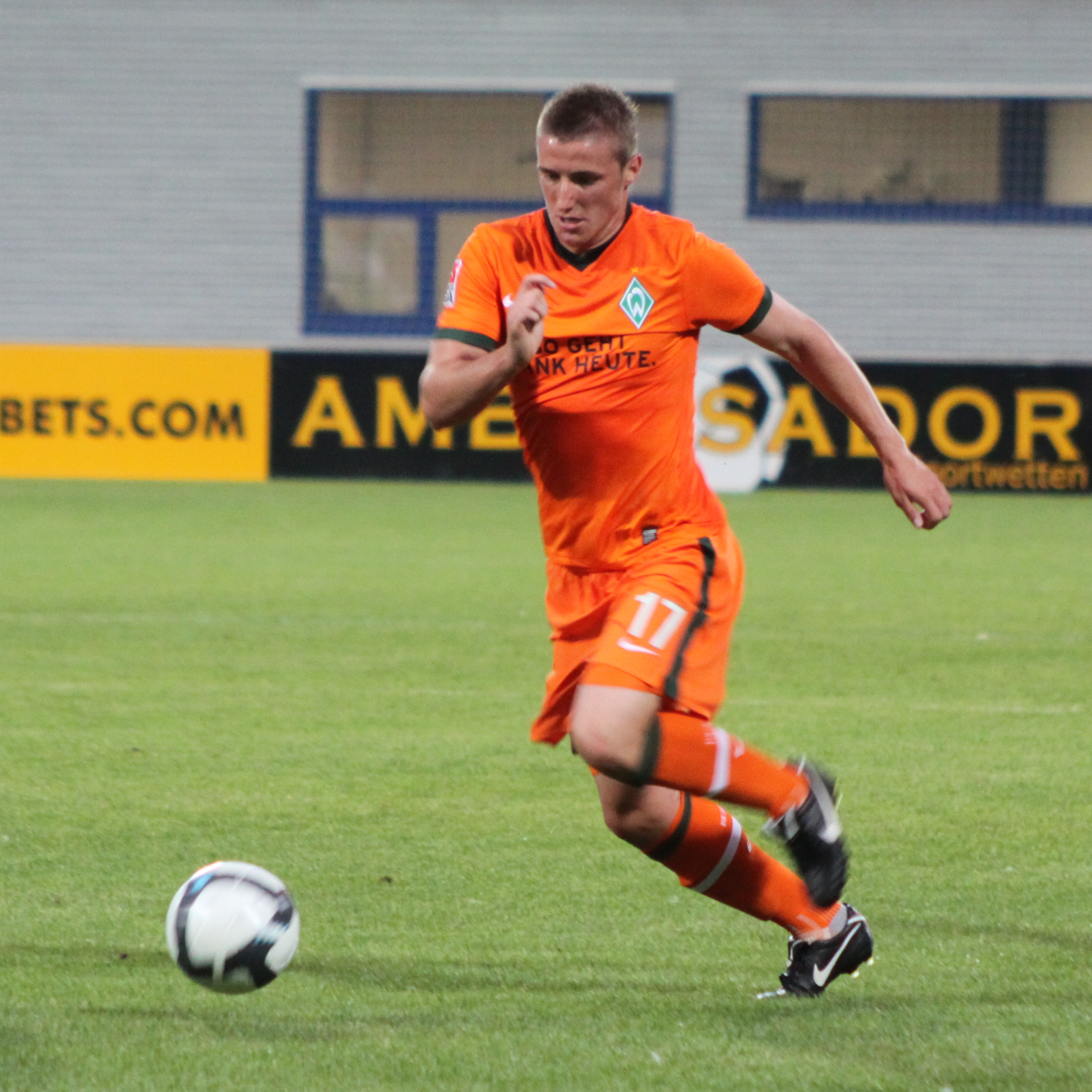 Said Husejinović - SV Werder Bremen (2)